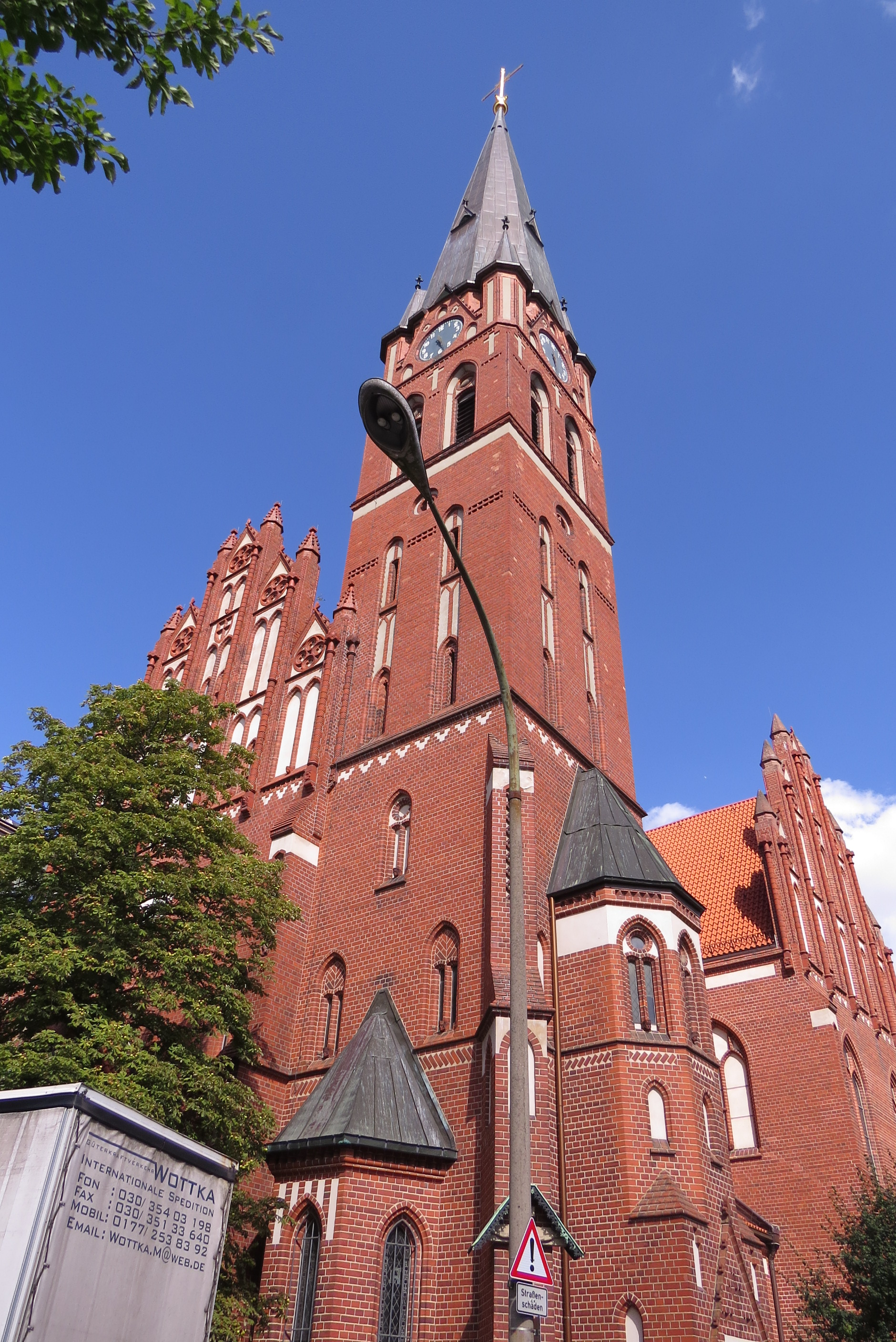 Kirche St. Georg, Berlin-Pankow, Kirchturm